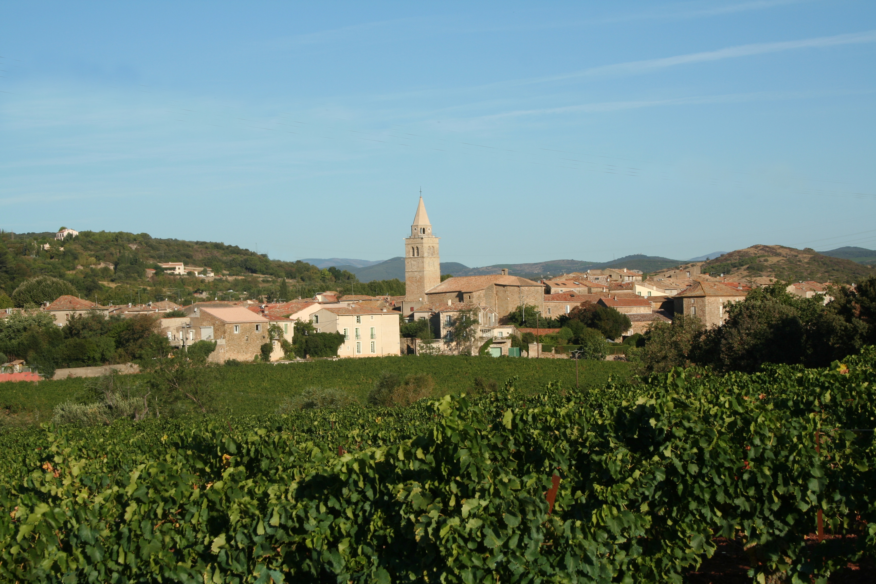 Gabian (Hérault) - vue générale .